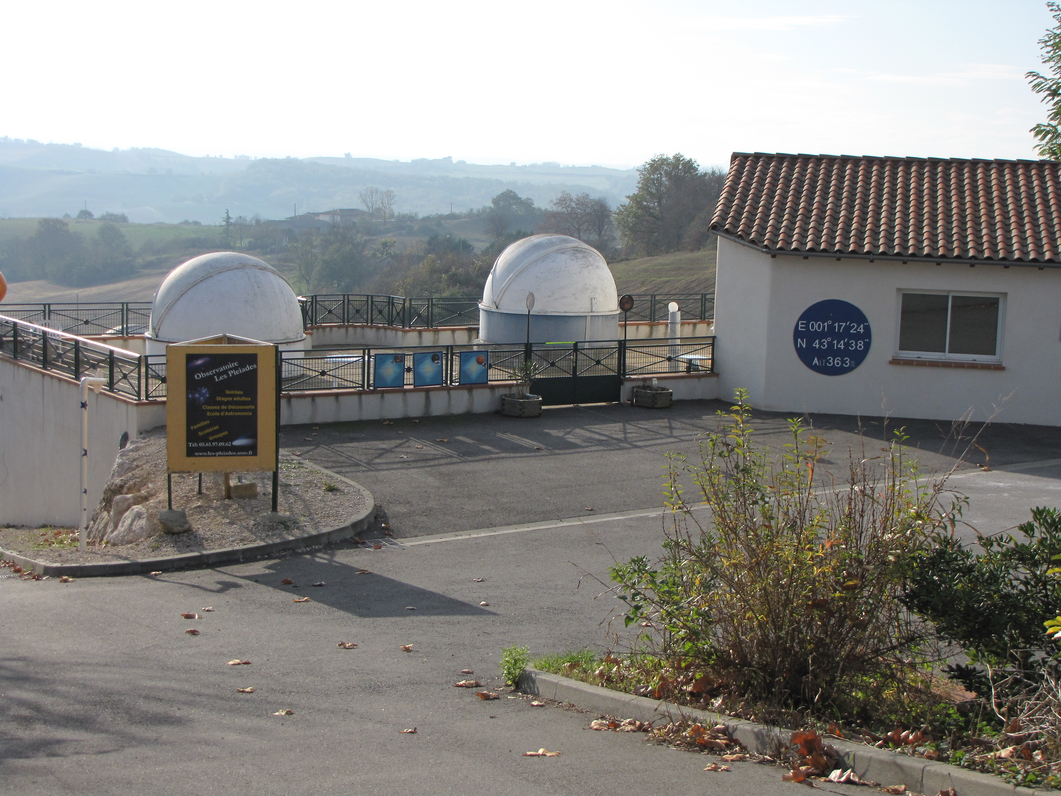 Observatoire les pleïades (Latrape)